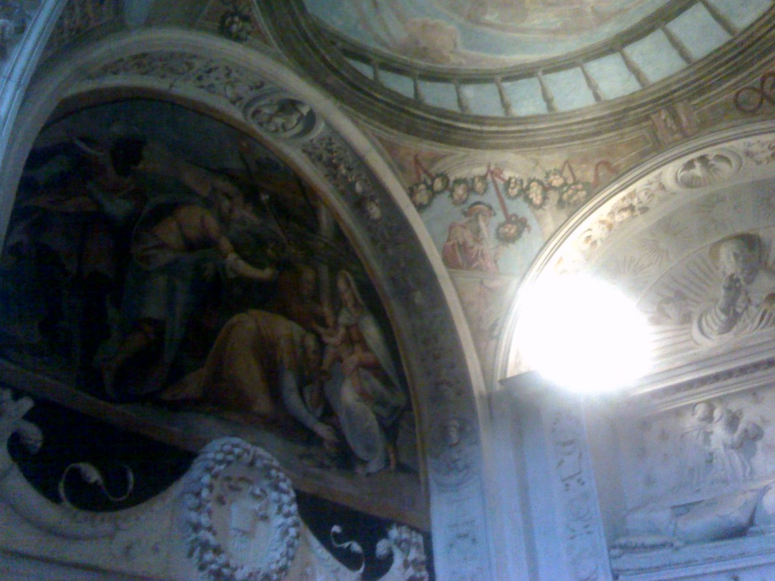 Chiesa di san Domenico Maggiore (Napoli) - Cappellone del Crocefisso, Adorazione dei Magi di Belisario Corenzio (1591)